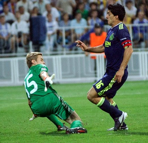 Luis Suárez